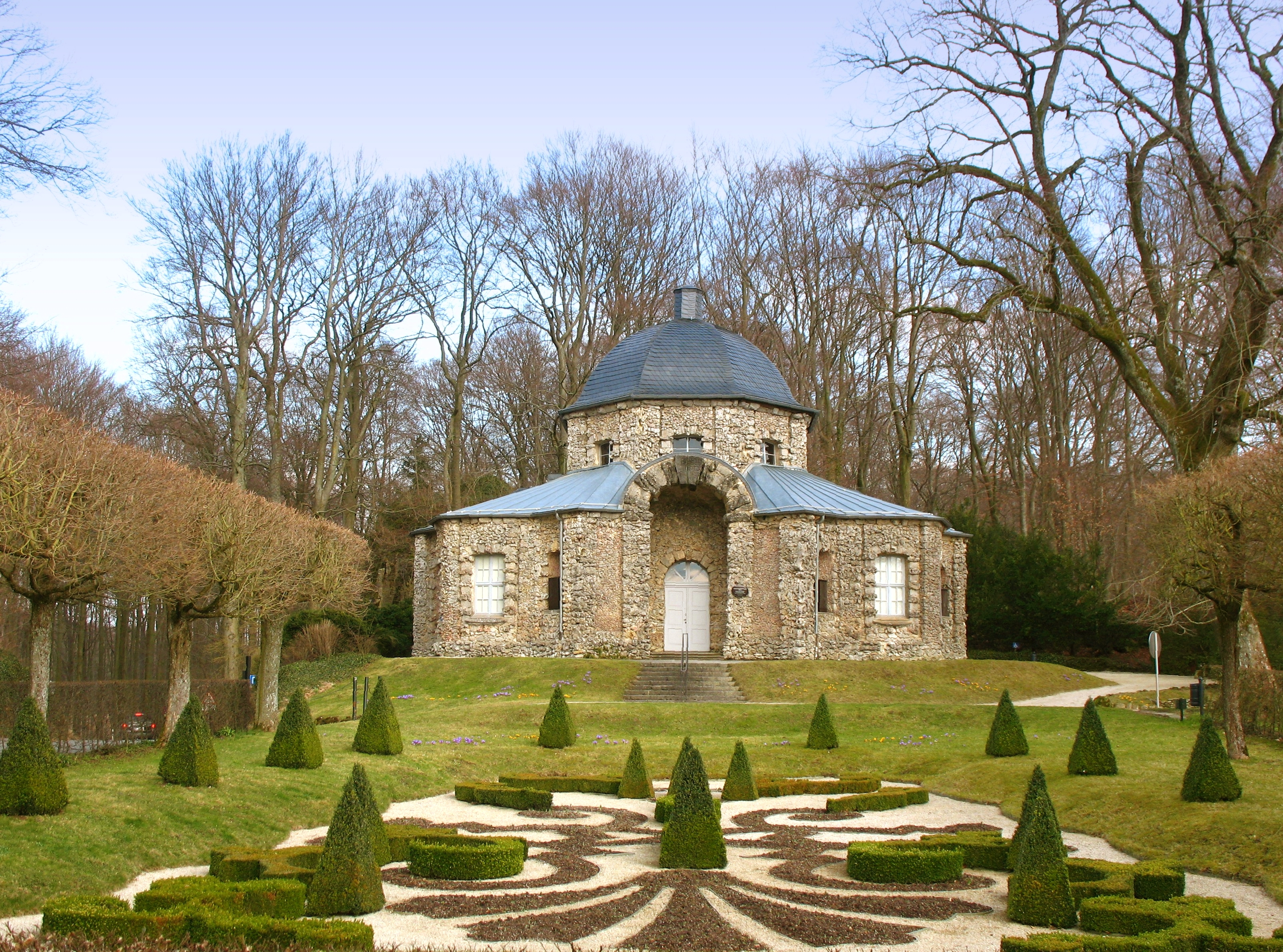 Morgenländischer Bau am Felsengarten Sanspareil